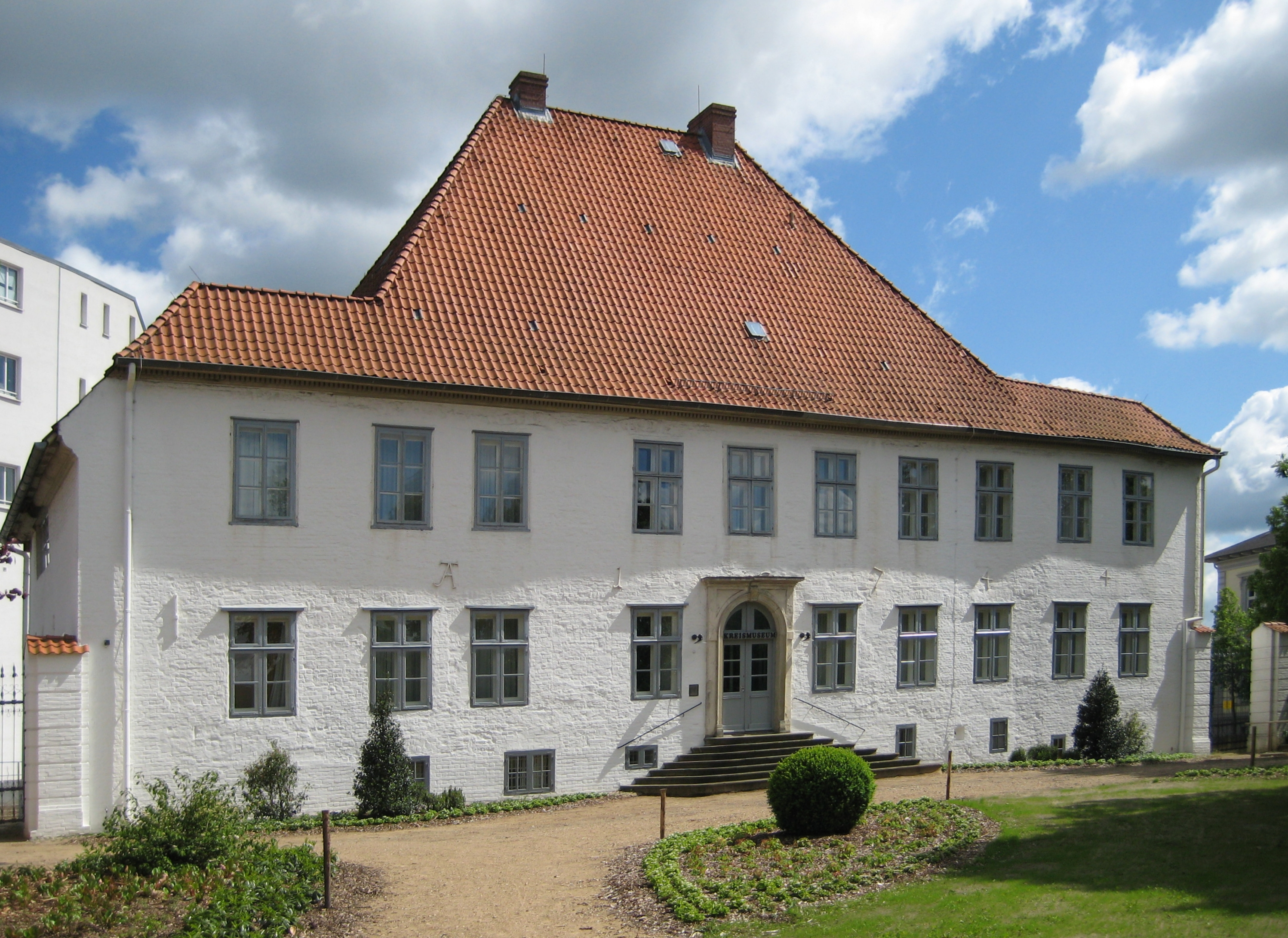 Das Kreismuseum des Kreises Steinburg in Itzehoe, Rueckseite